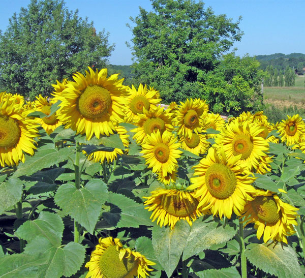 Fleurs de tournesol